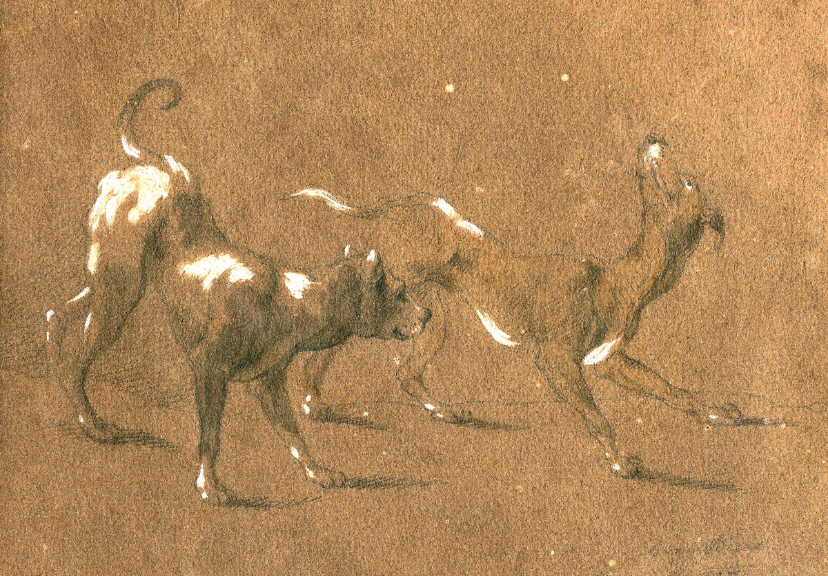 Hunting dogs